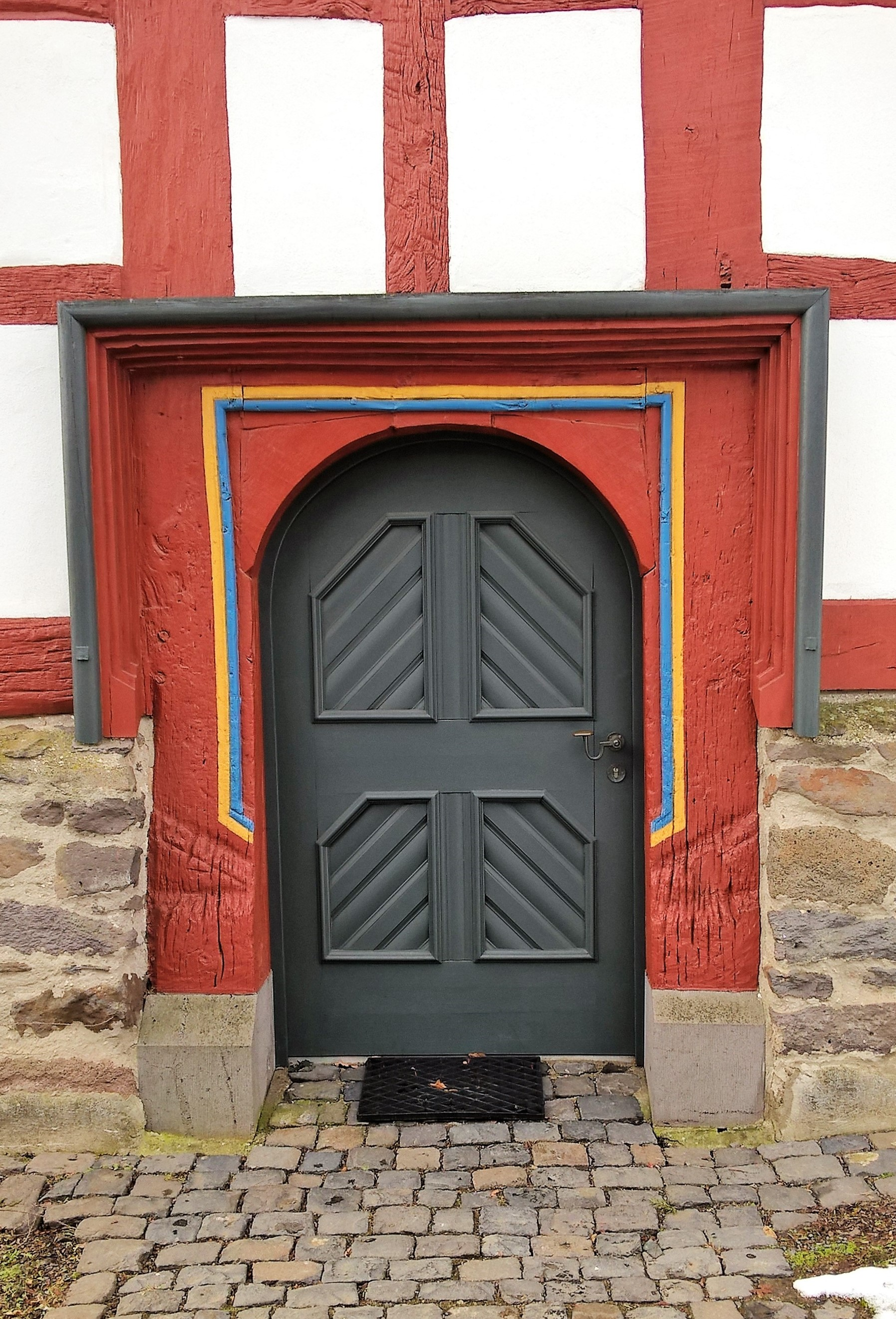 Evangelische Kirche Ilsdorf (ursprünglich Bernsfeld), Gemeinde Mücke, Vogelsbergkreis, Hessen, Deutschland